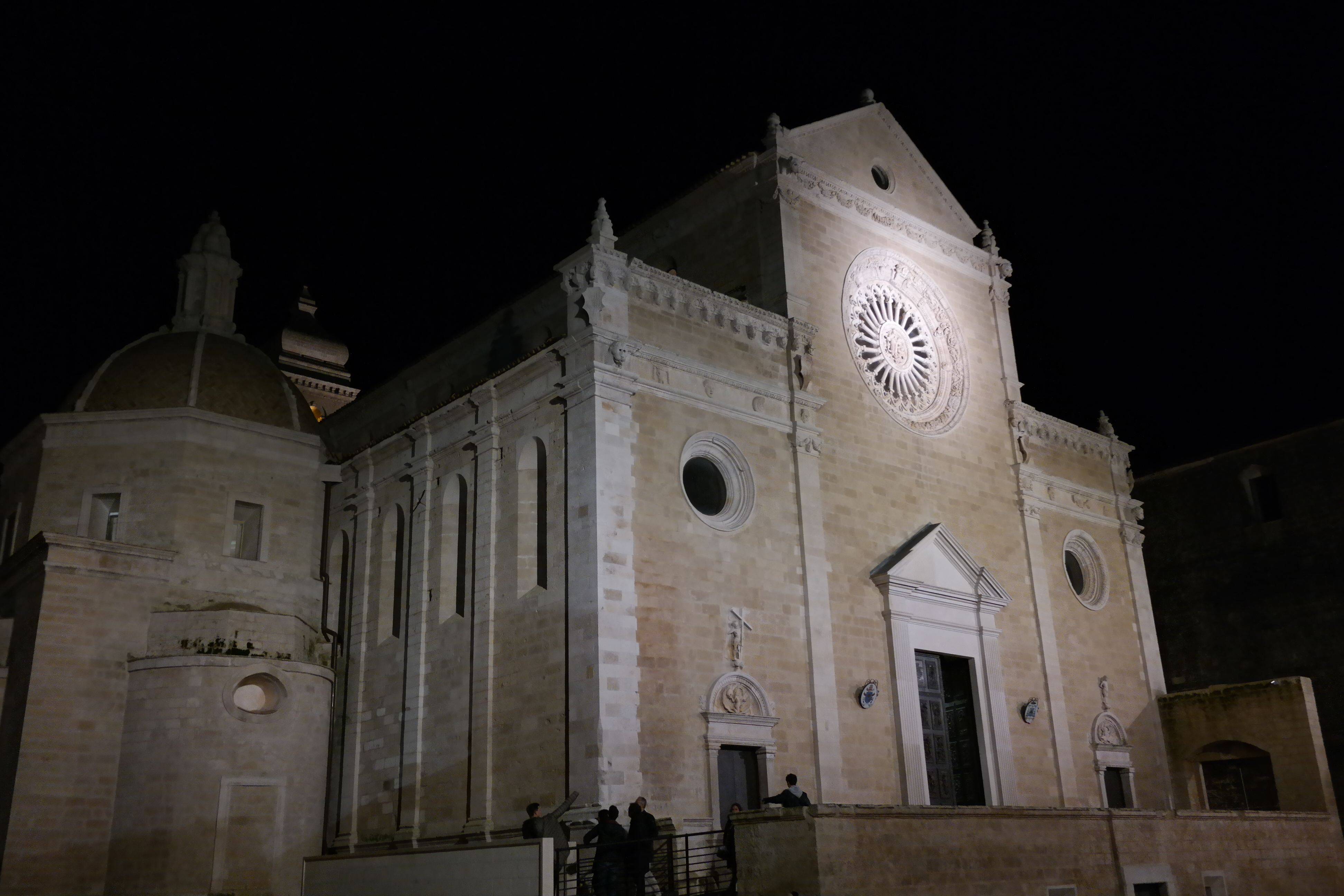 Cattedrale di Gravina di Puglia